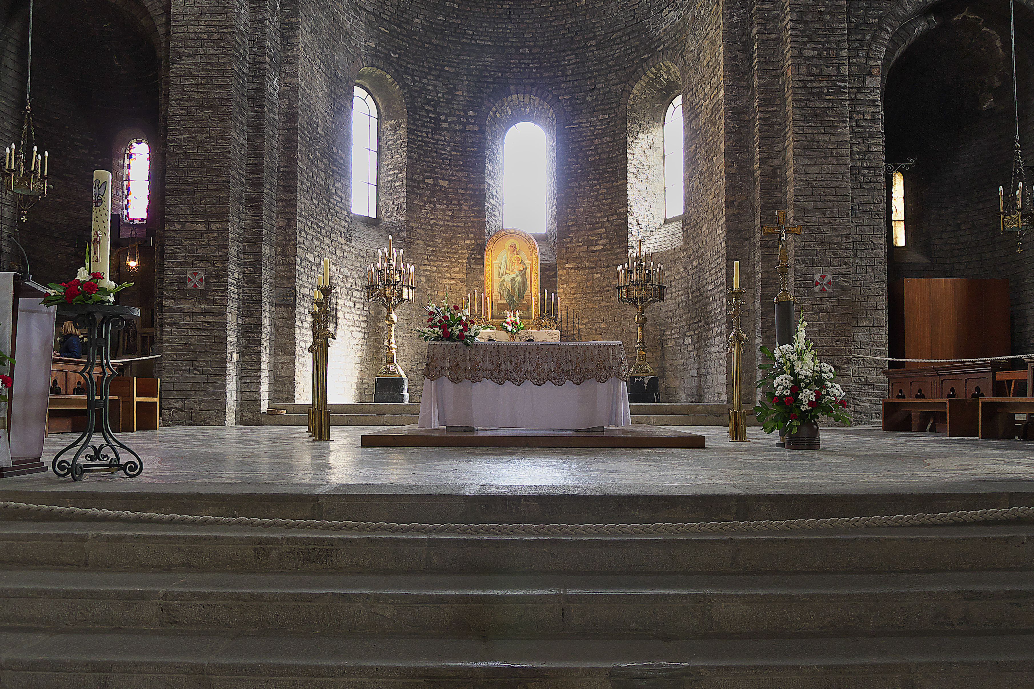 Cabecera actual de la iglesia